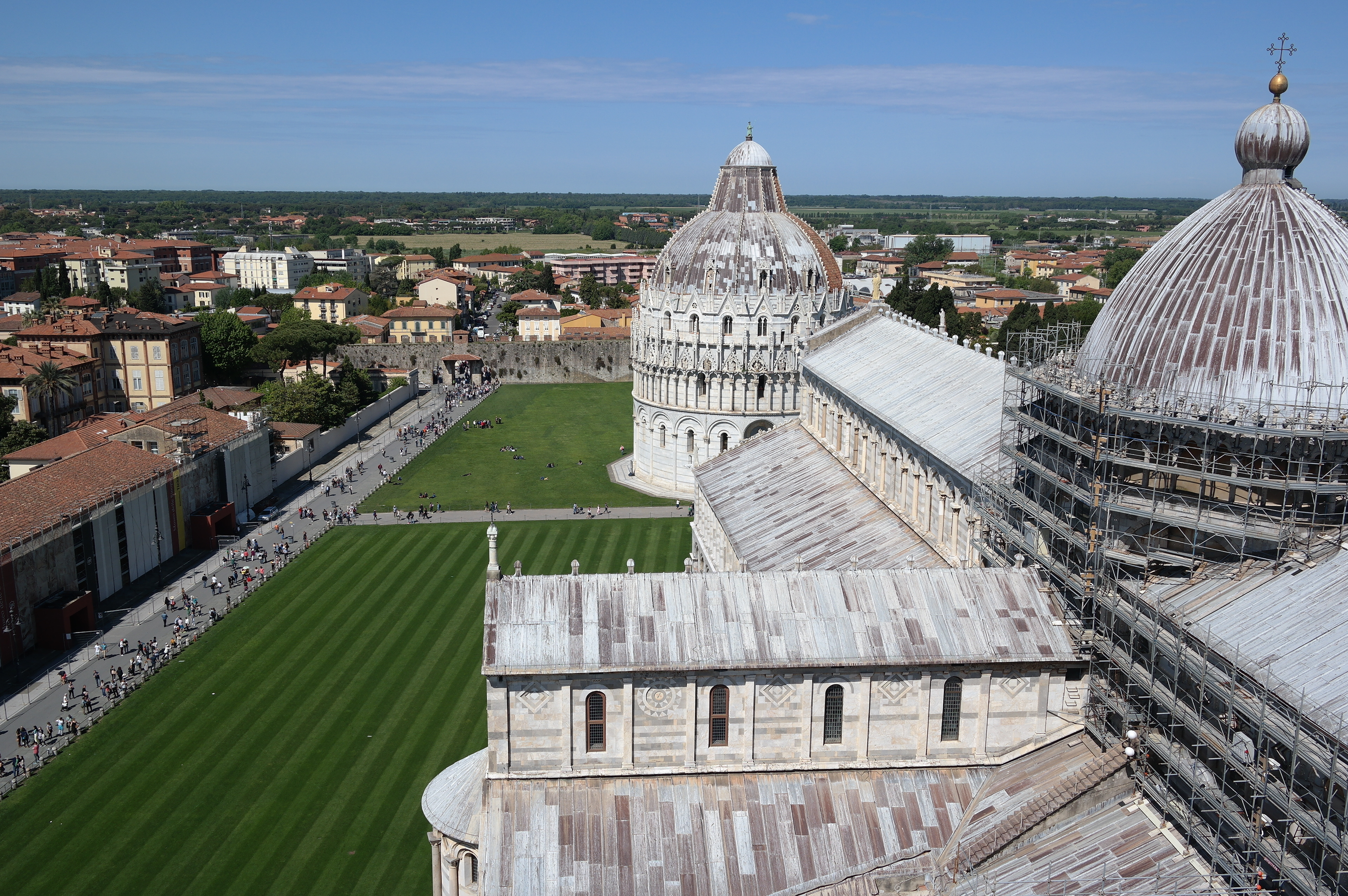 Piazza dei Miracoli vista dalla Torre pendente